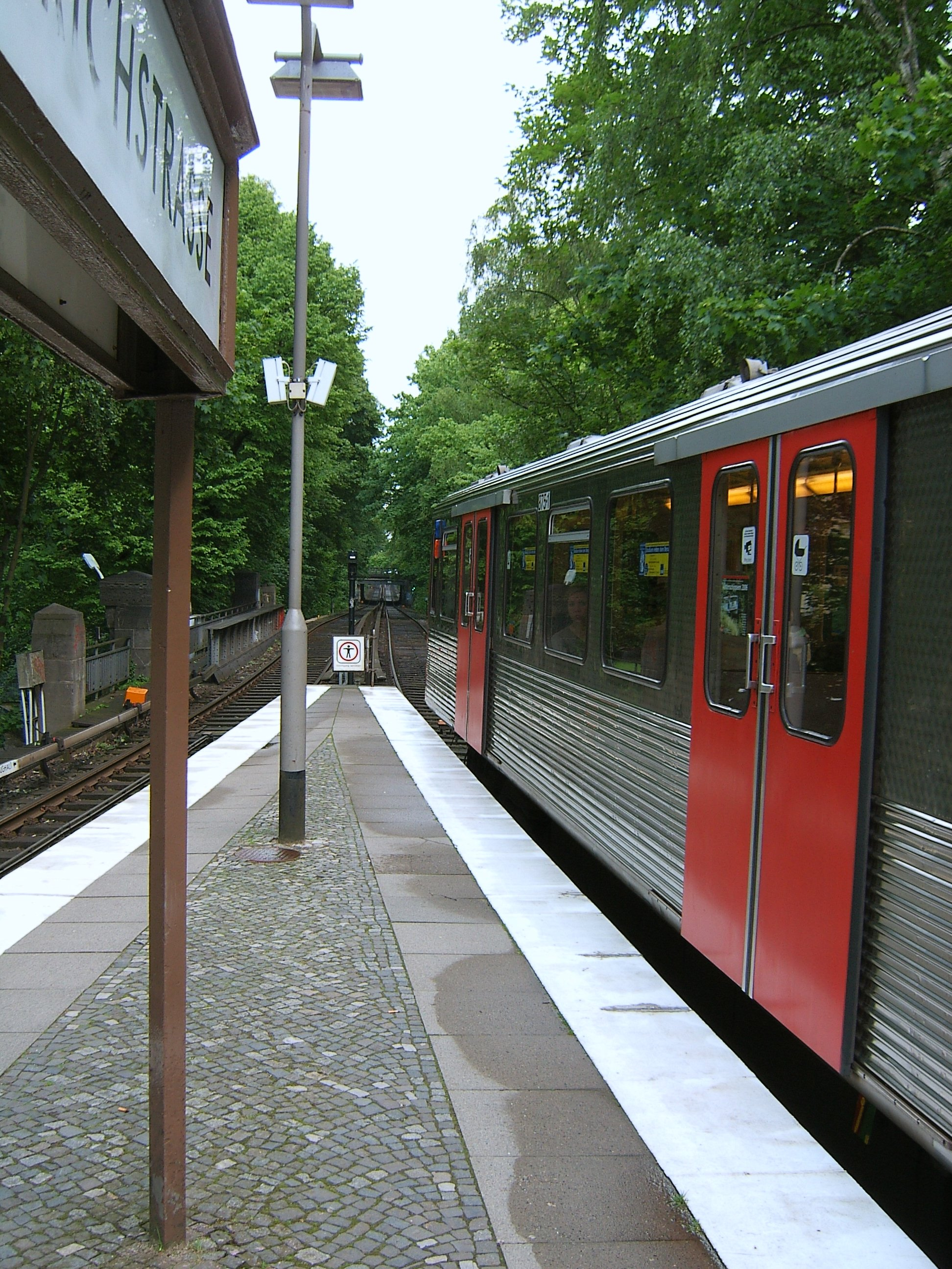 Hamburg, Winterhude, U-Bahnhof Sierichstraße